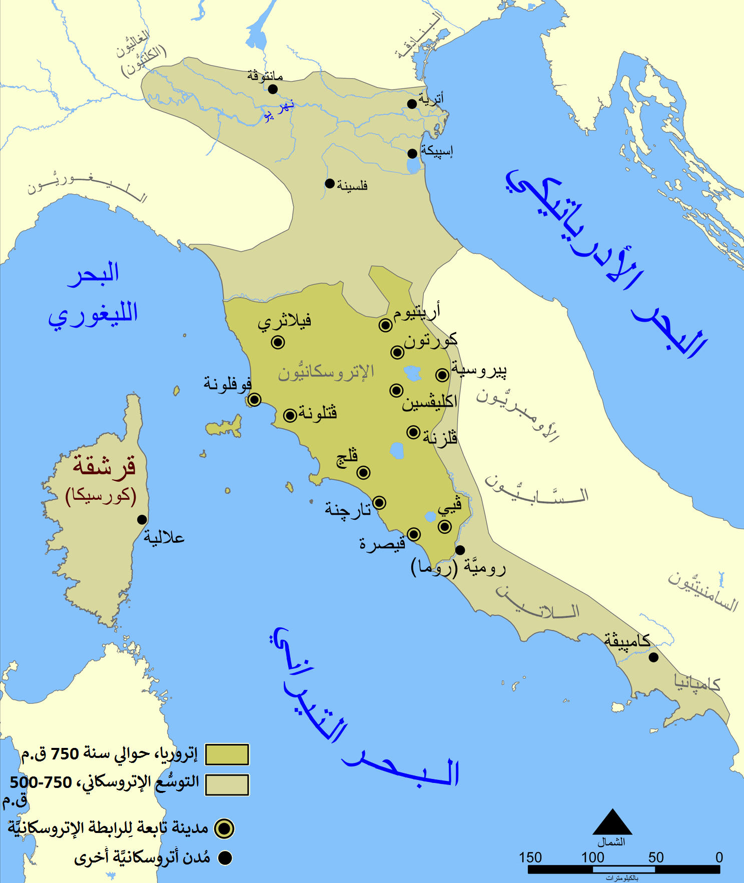 خريطة تُظهر نطاق الحضارتين الإترورياويَّة والإتروسكانيَّة. تتضمَّن هذه الخريطة 12 مدينة انتمت إلى الرابطة الإتروسكانيَّة ومُدن مُهمَّة وبارزة أُخرى كانت قائمة ضمن بلاد الإتروسكان.